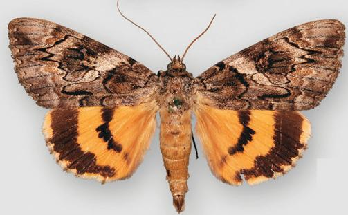 Catocala dionyza